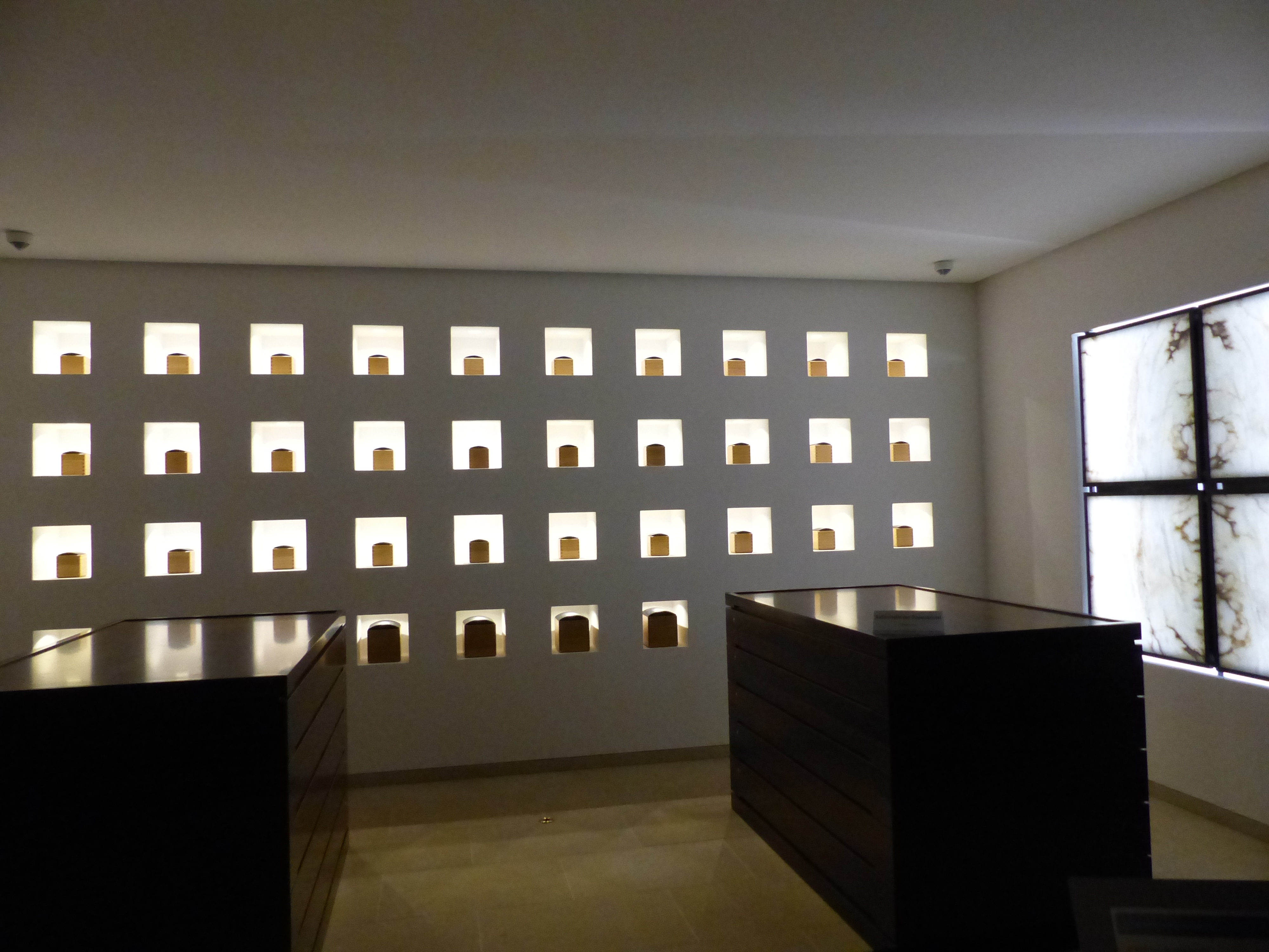 Reliquienraum im Untergeschoss des Bischofssitzes Limburg